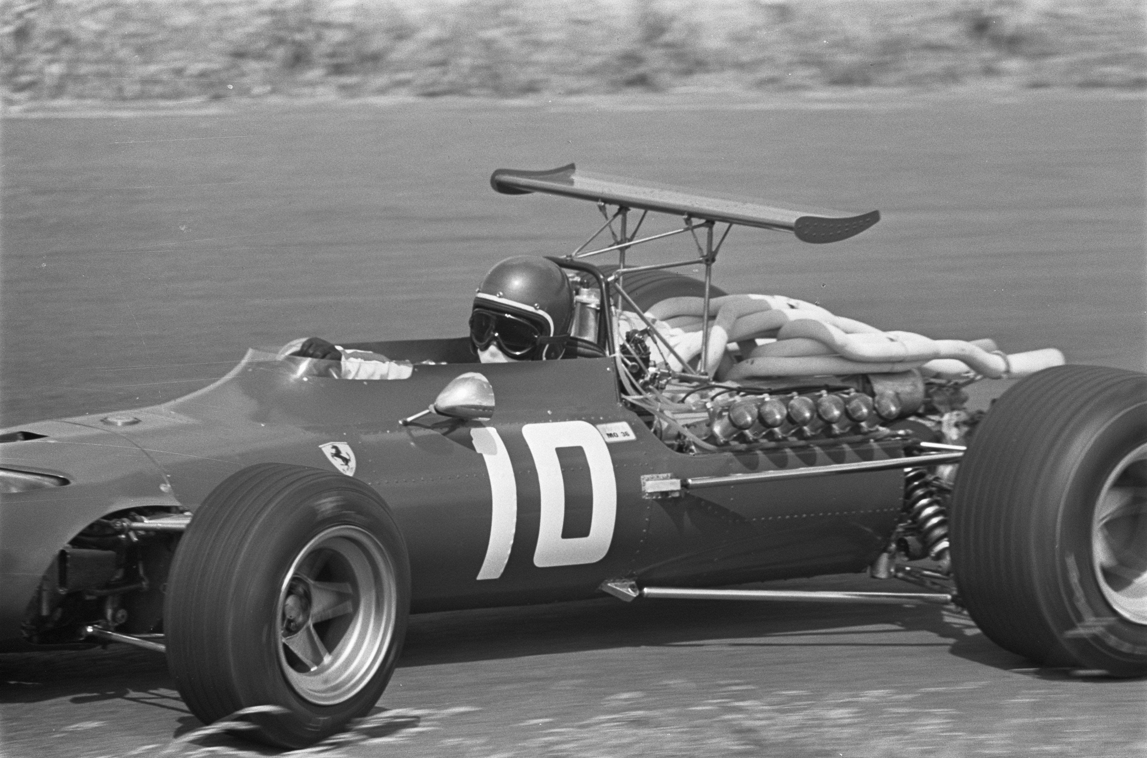 Grand Prix 68 Zandvoort training. Nummer 30 Jackie Lokx (Ferrari).